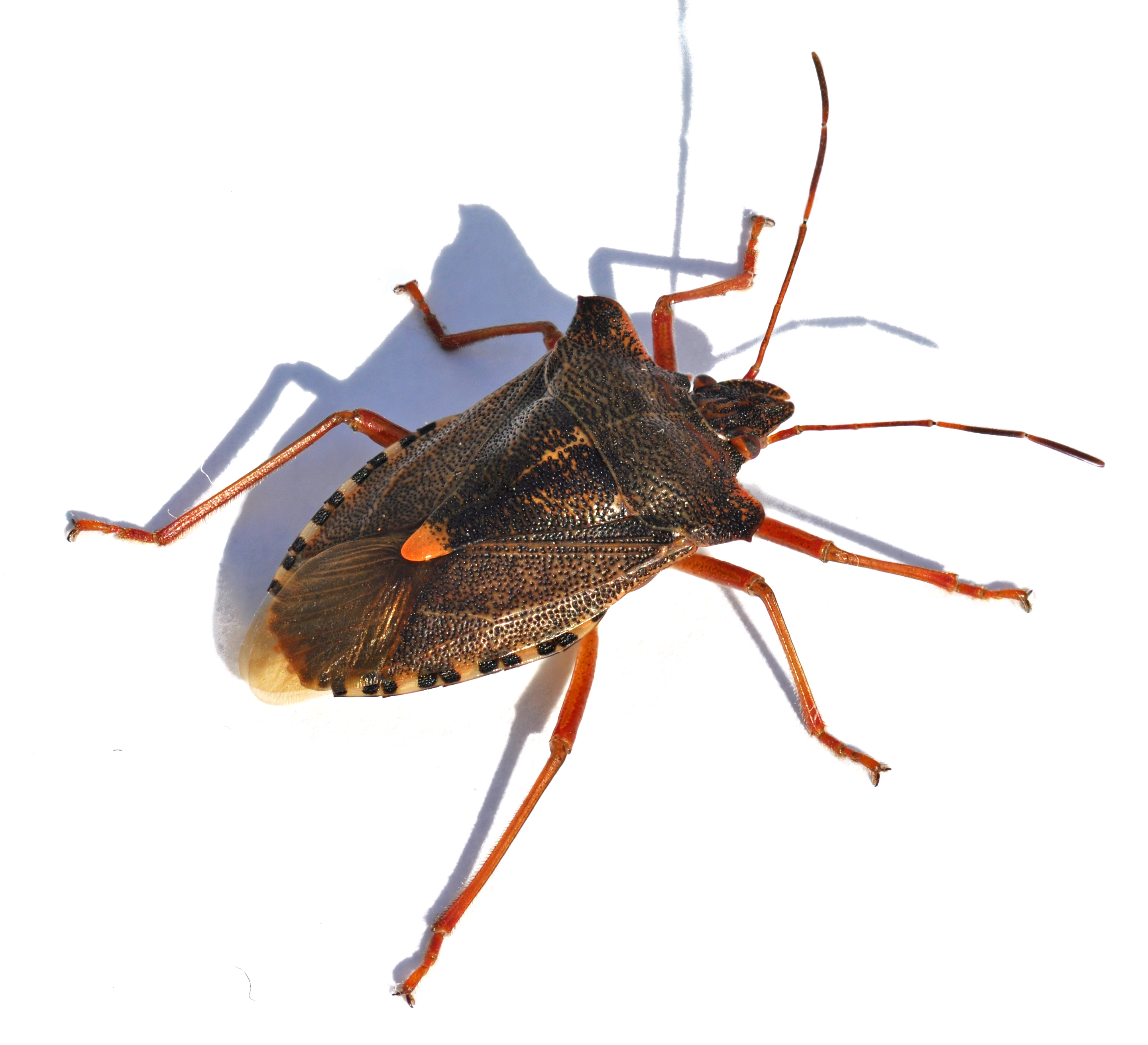 Rotbeinige Baumwanze (Pentatoma rufipes), fotografiert in der Nähe von Basel